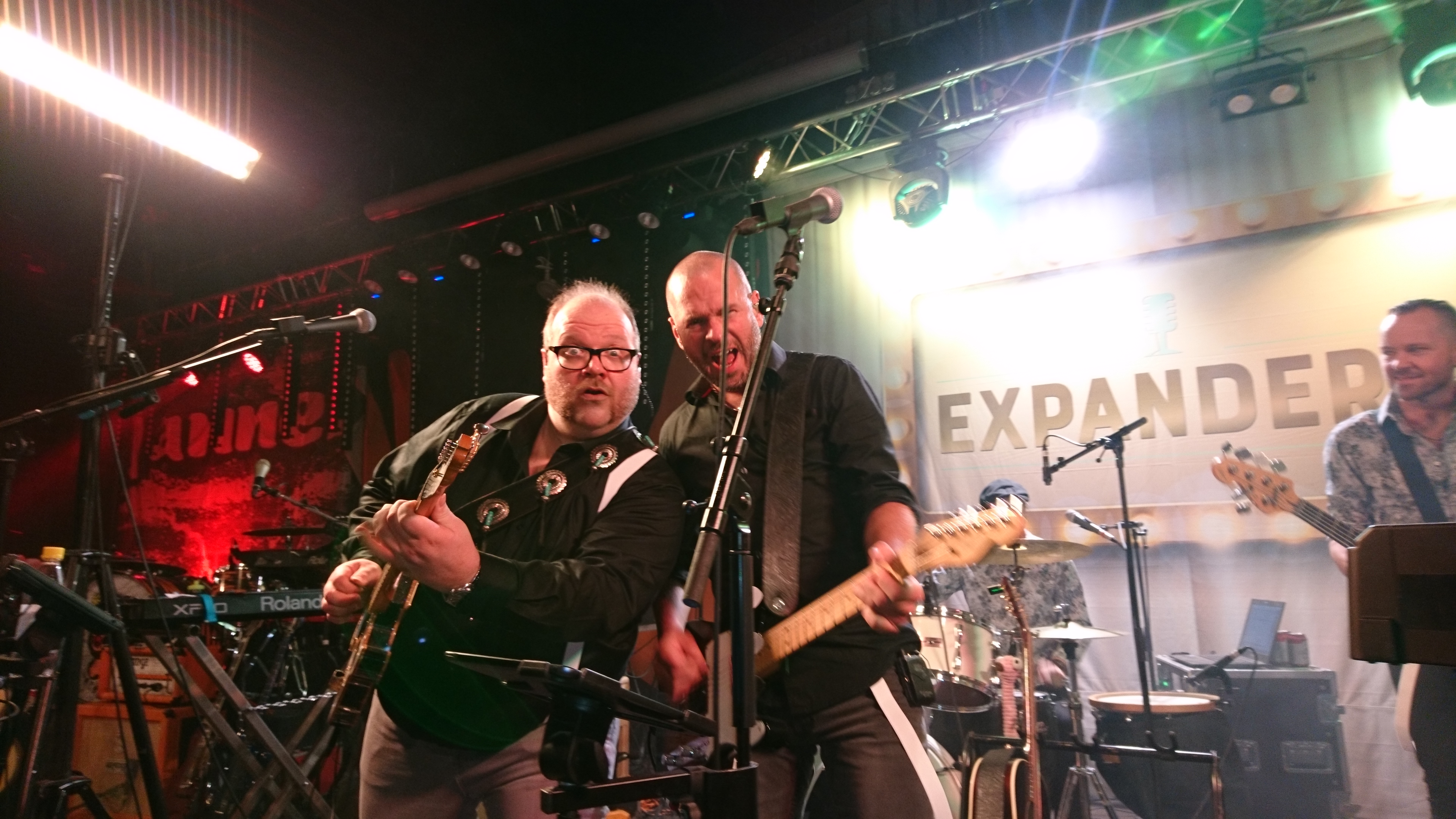 Expanders på Dansmaran i Härnösand, fredag 4 februari 2017.